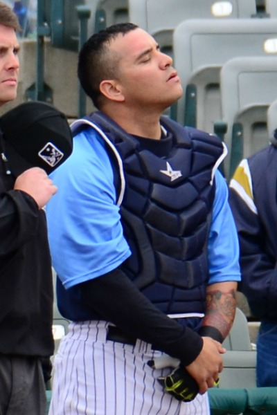 Sebastián Valle